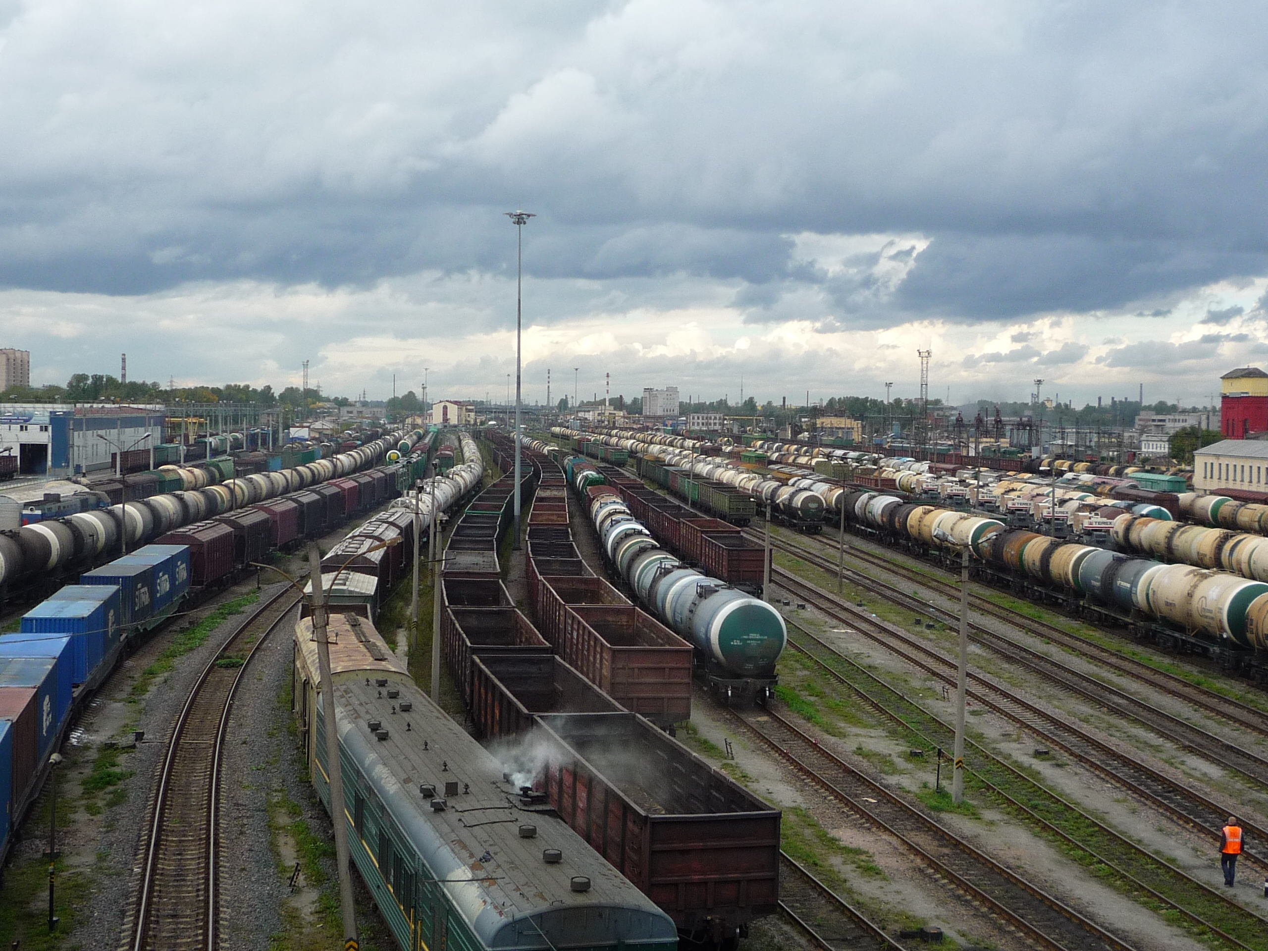 Сортировка